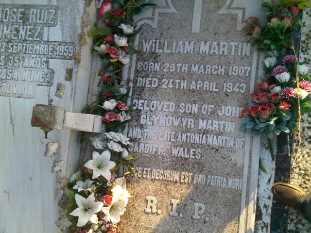 Fotografia de lápida de la tumba de William Martin en el cementerio de Huelva, Espña. Tomada el 2011-08-12